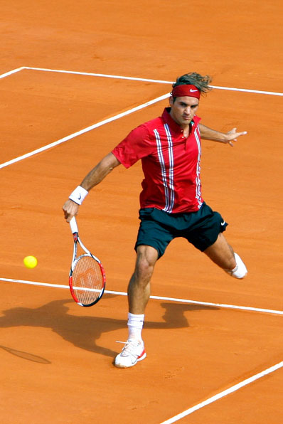 Roger Federer, Master Series Monte Carlo 2007